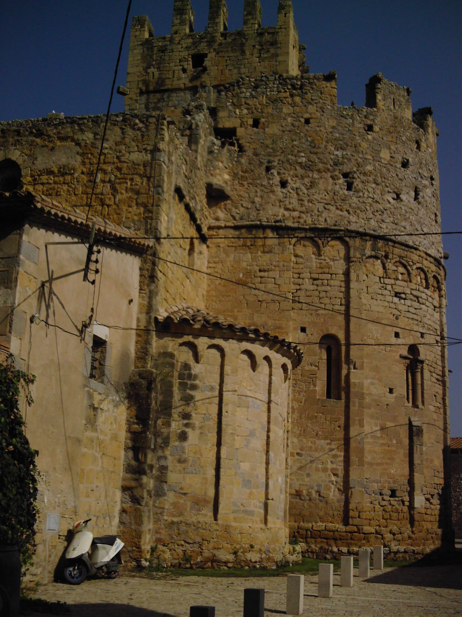 Església de Sant Miquel de Fluvià (Alt Empordà)